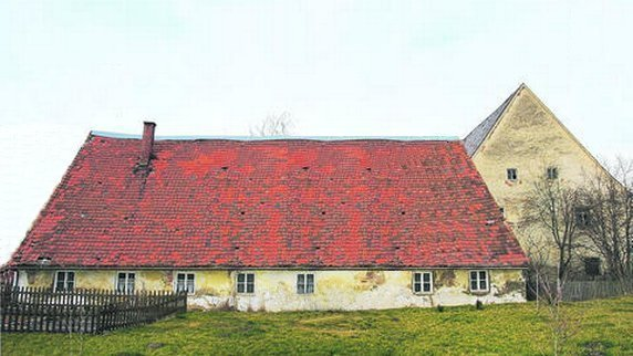 Ehemaliges Schlossgut Iglhof in Affing-Iglbach (Ende 17. Jahrhundert); Im März 2007 wurde das ehemalige Langhaus abgebrochen.